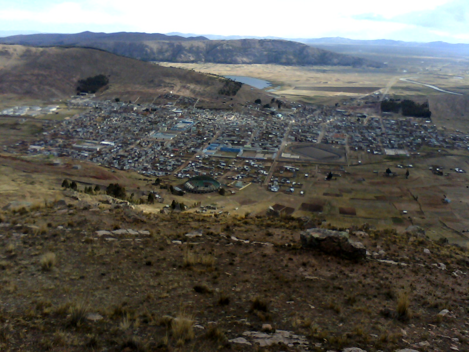 Huancane